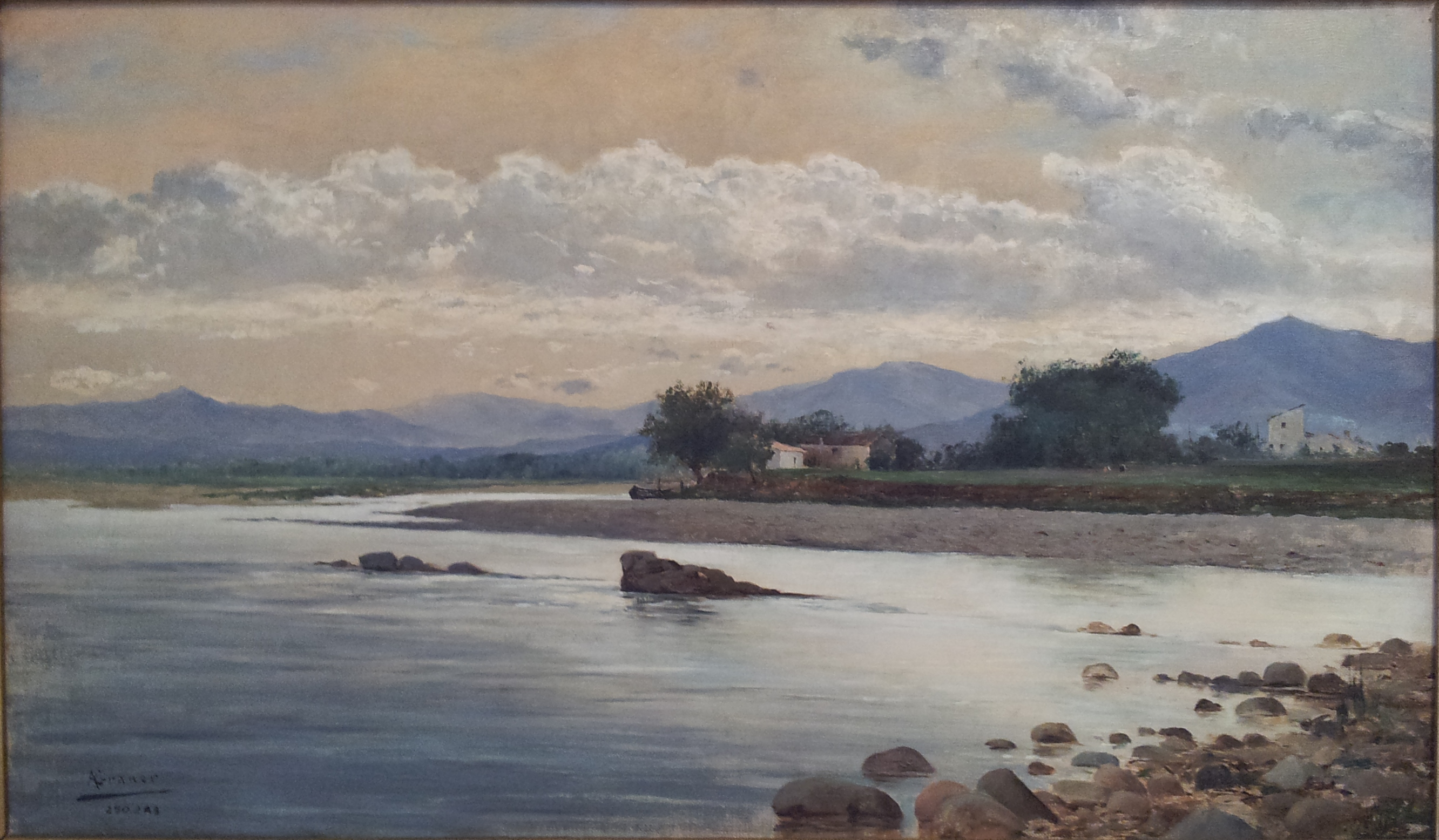 Pintura sobre tela exposada al md'A, Girona